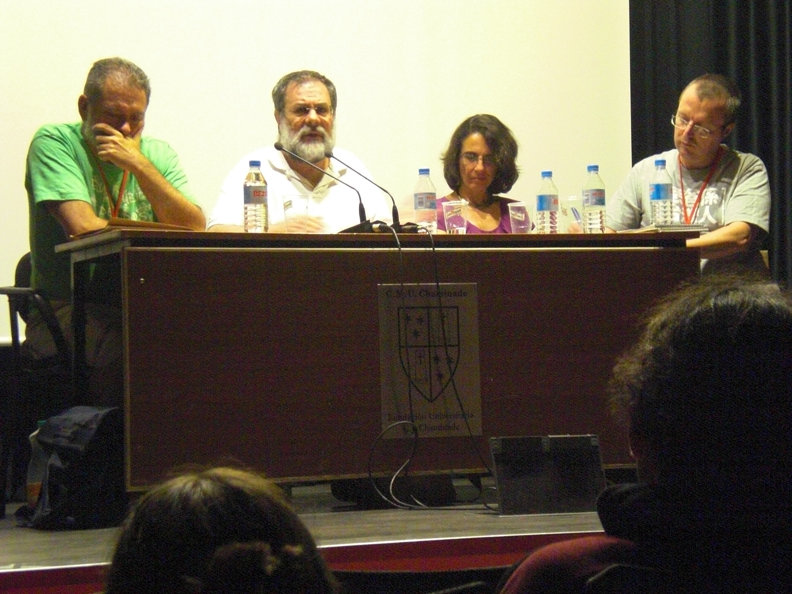 debato